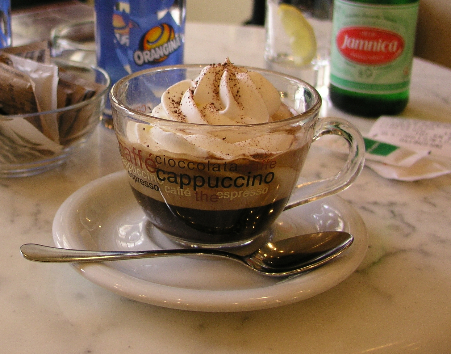 Kava sa šlagom